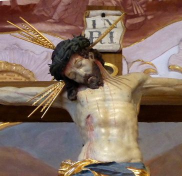 Detail des gekreuzigten Christus in der Wallfahrtskirche Heilig Kreuz in Mindelaltheim